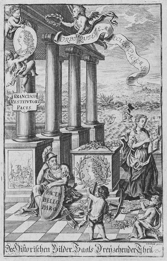 Johann Michael Stock: Titelkupfer zum 13. Band von: Neu-eröffneter Historischer Bilder-Saal, Das ist: Kurtze, deutliche und unpassionirte Beschreibung Der Historiae Universalis, Nürnberg 1762